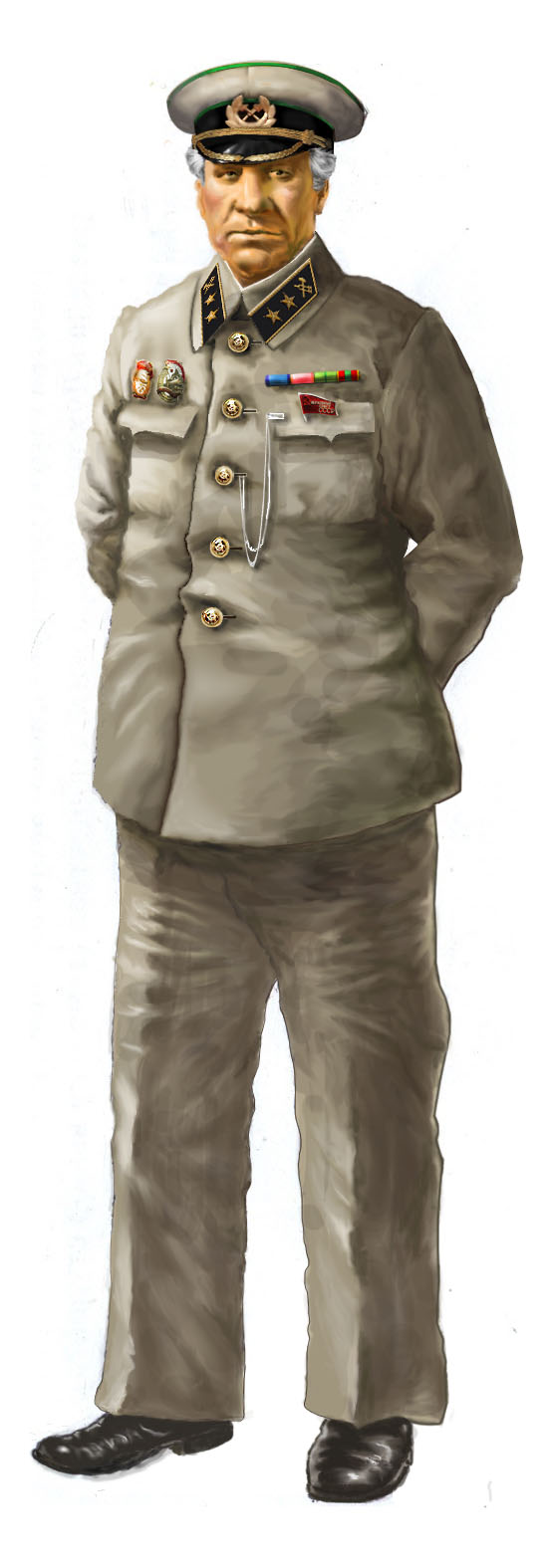 Начальник отделения железной дороги, заместитель Начальника дороги (высший начсостав) в летней форме (1955-1963 гг.).